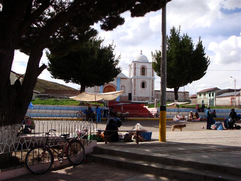 Este templo fué construido a puro esfuerzo de la población, que con su fe y con sus brazos hicieron posible lo que es ahora: Un lugar donde elevan sus oraciones. Posee en su campanario, un par de campanas con mucha historia y cuyo sonido alcanza hasta unos 4 Km de distancia